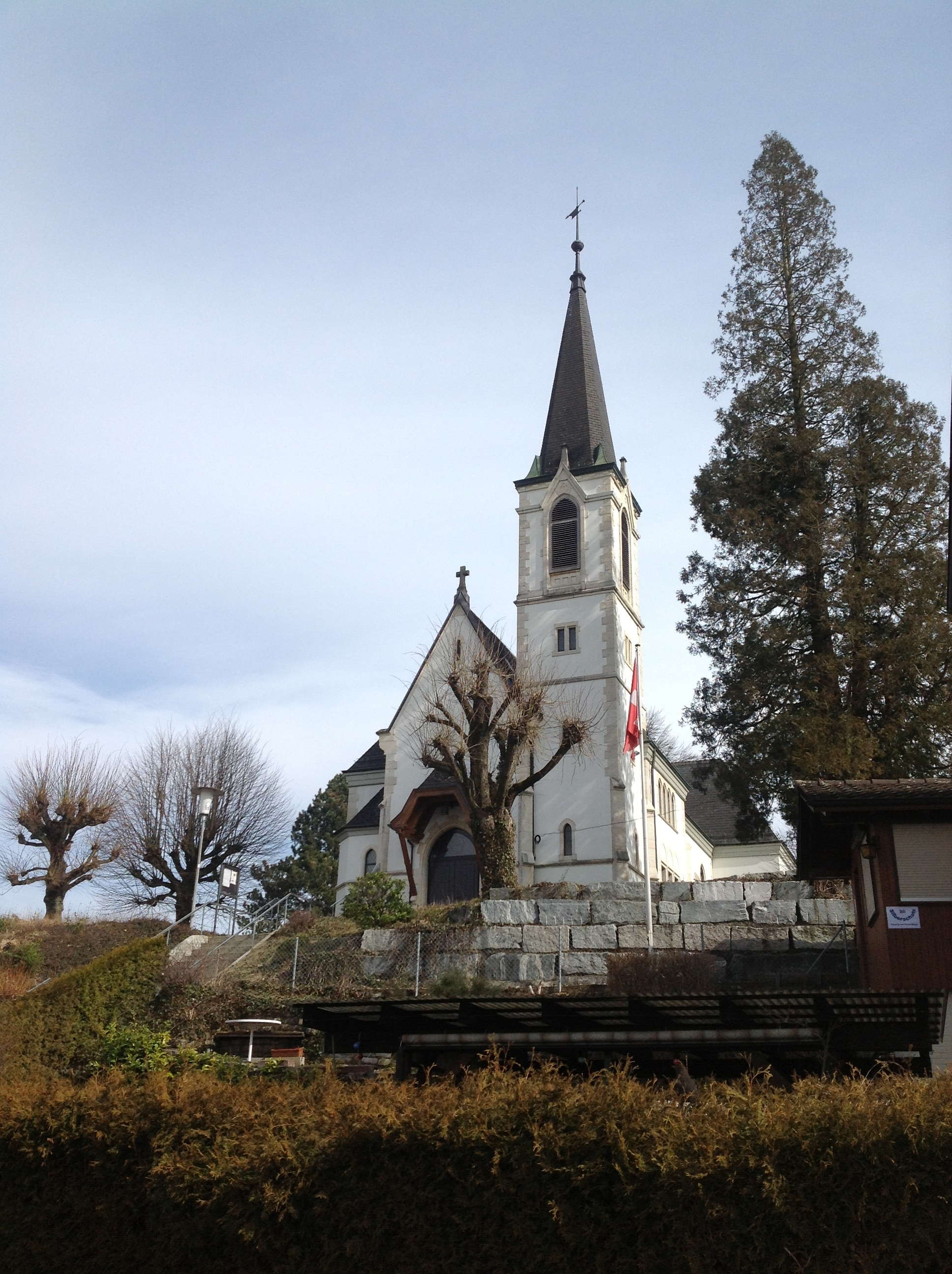 Reformierte Kirche in Laufen BL